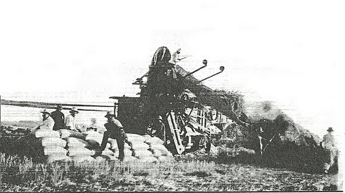 Obreros rurales trabajando en el campo, Merlo, provincia de Buenos Aires, 1880.